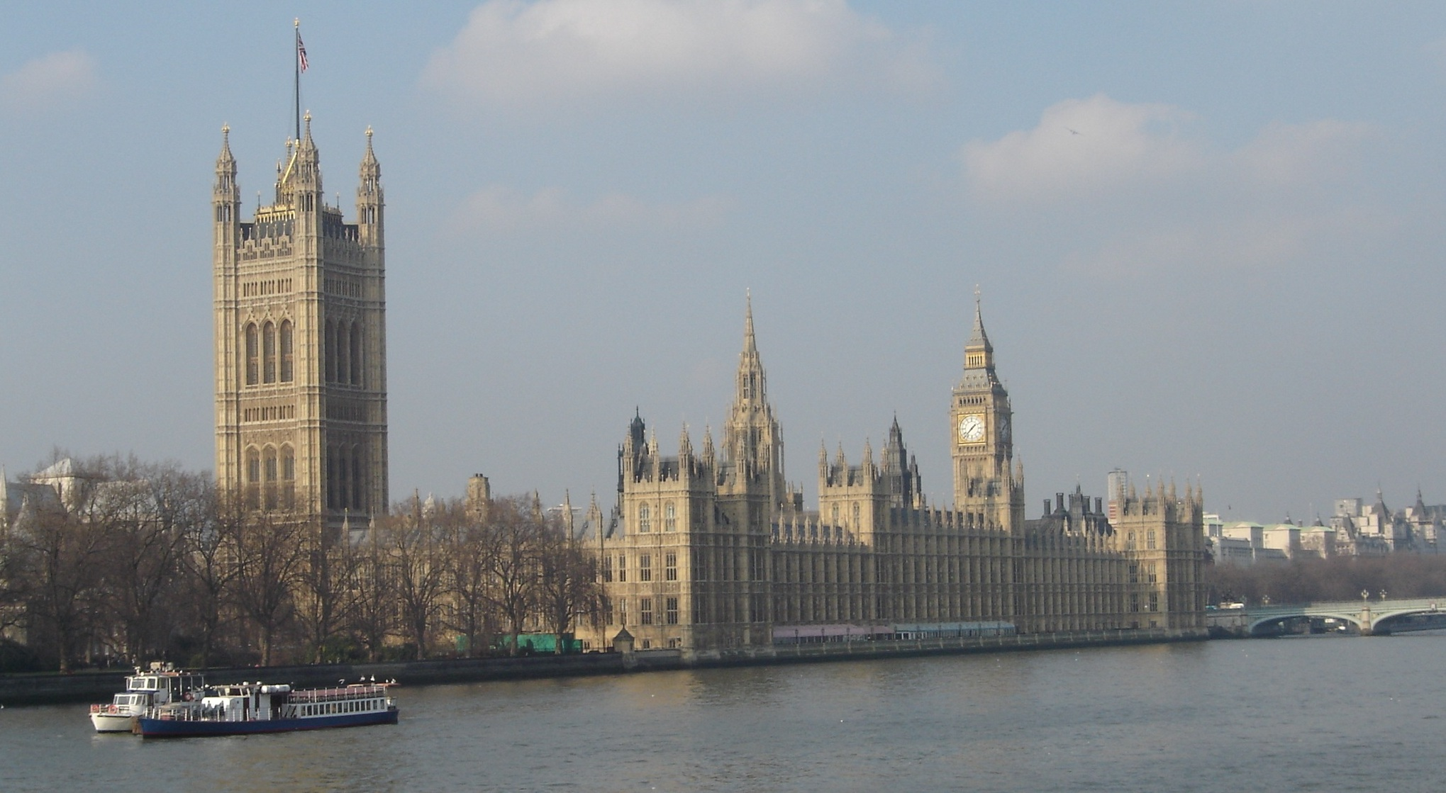 Palais de Westminster.